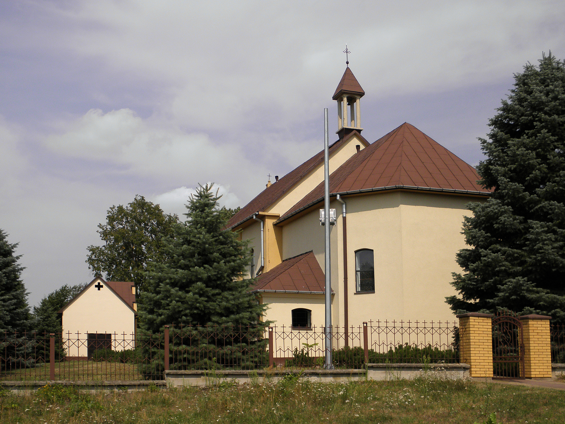 Łagów - kościół pw. św. Floriana (zabytek nr 329/A)